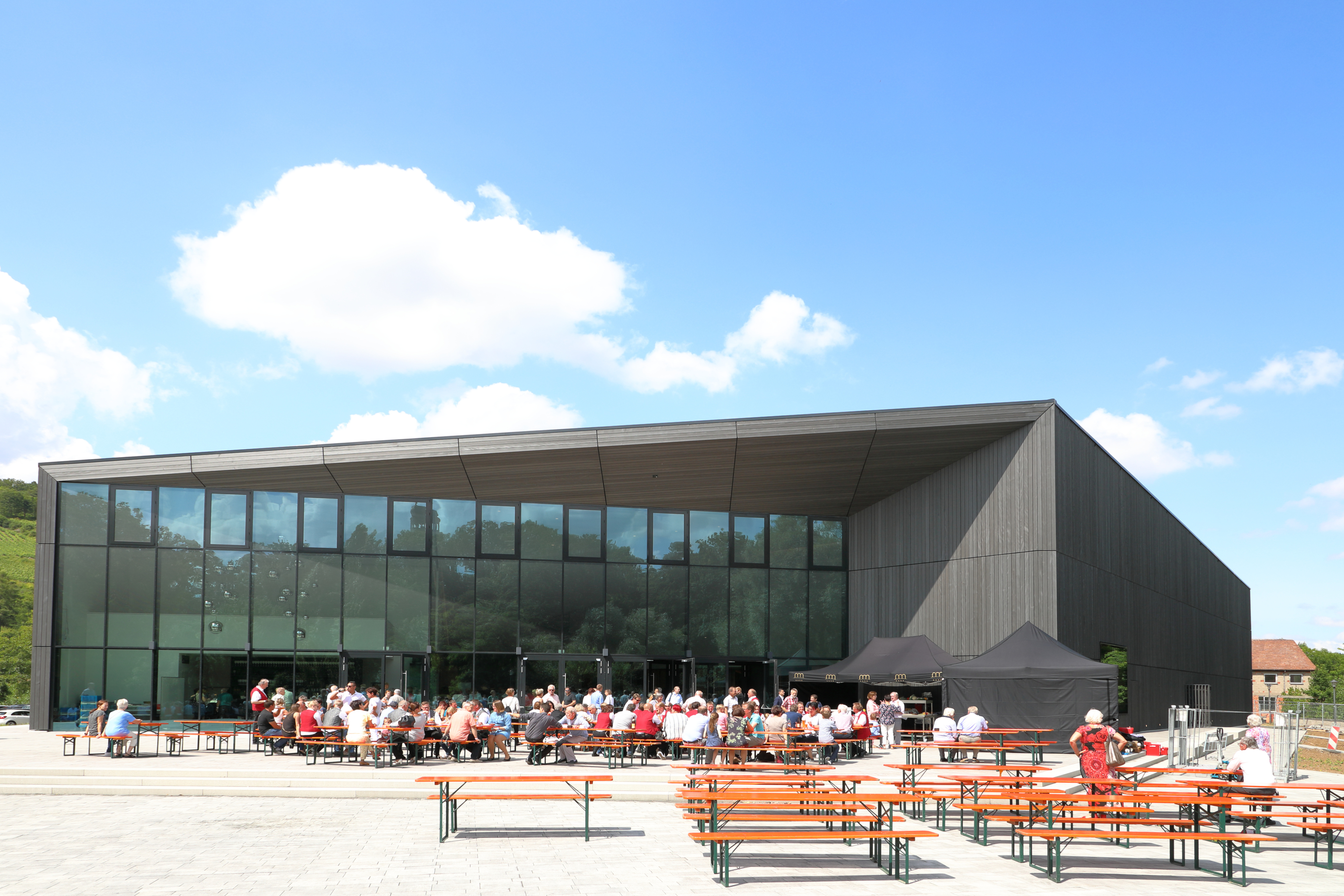 In der Tauberphilharmonie Weikersheim am Tag der Eröffnung im Juli 2019.